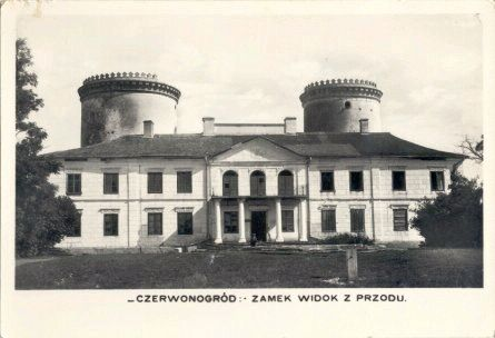 Червоногородський замок